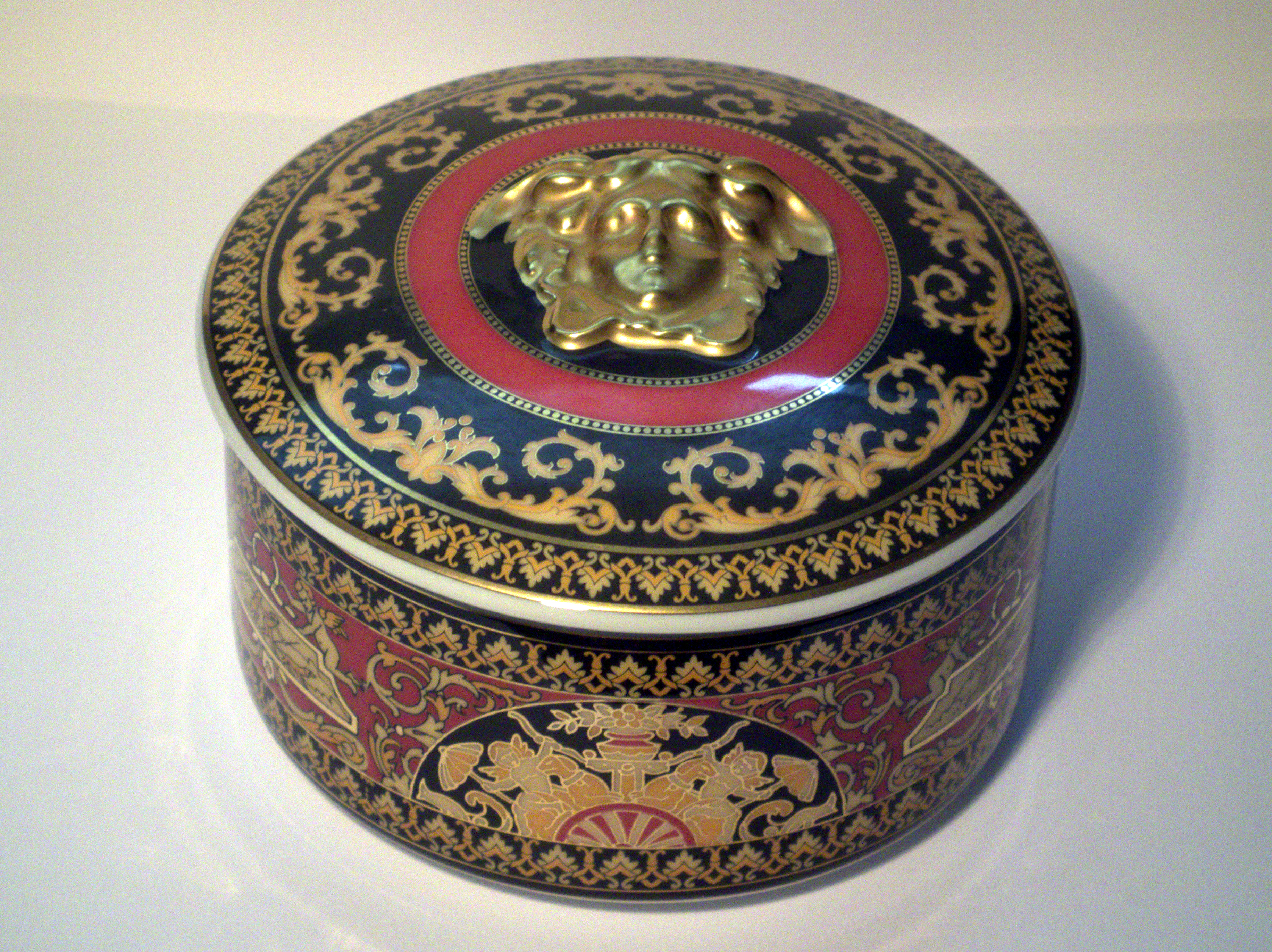 Rosenthal Porzellandose, Dekor Versace Medusa